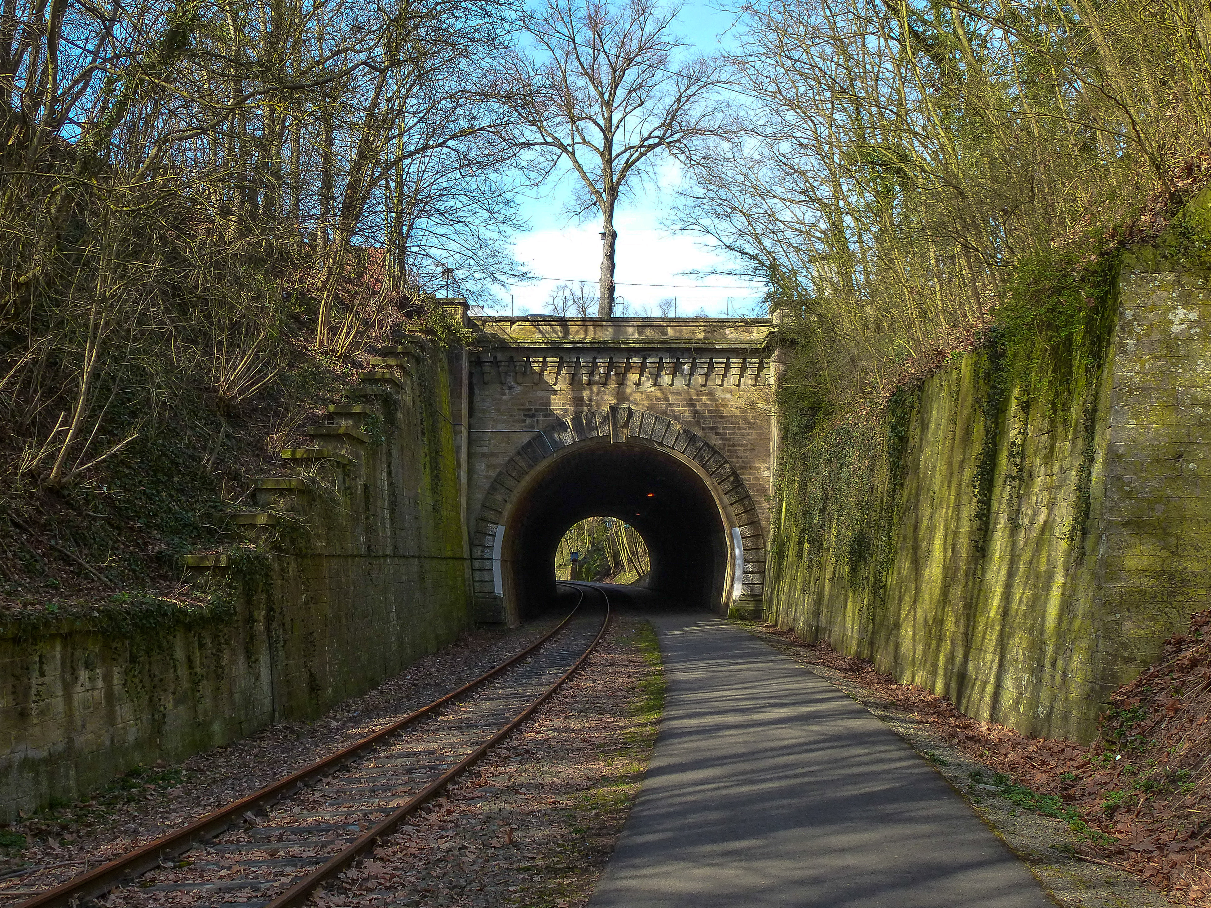 Meisenheimer Eisenbahntunnel Südseite